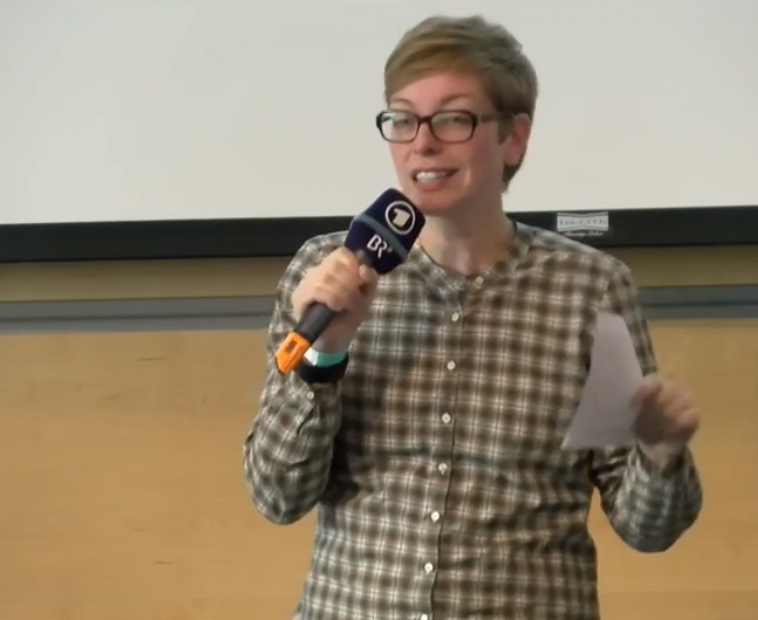 Susanne Klingner, 1978 in Berlin (Ost) geboren, Studium der Politikwissenschaft und Journalistik in Leipzig, Volontariat bei der taz.